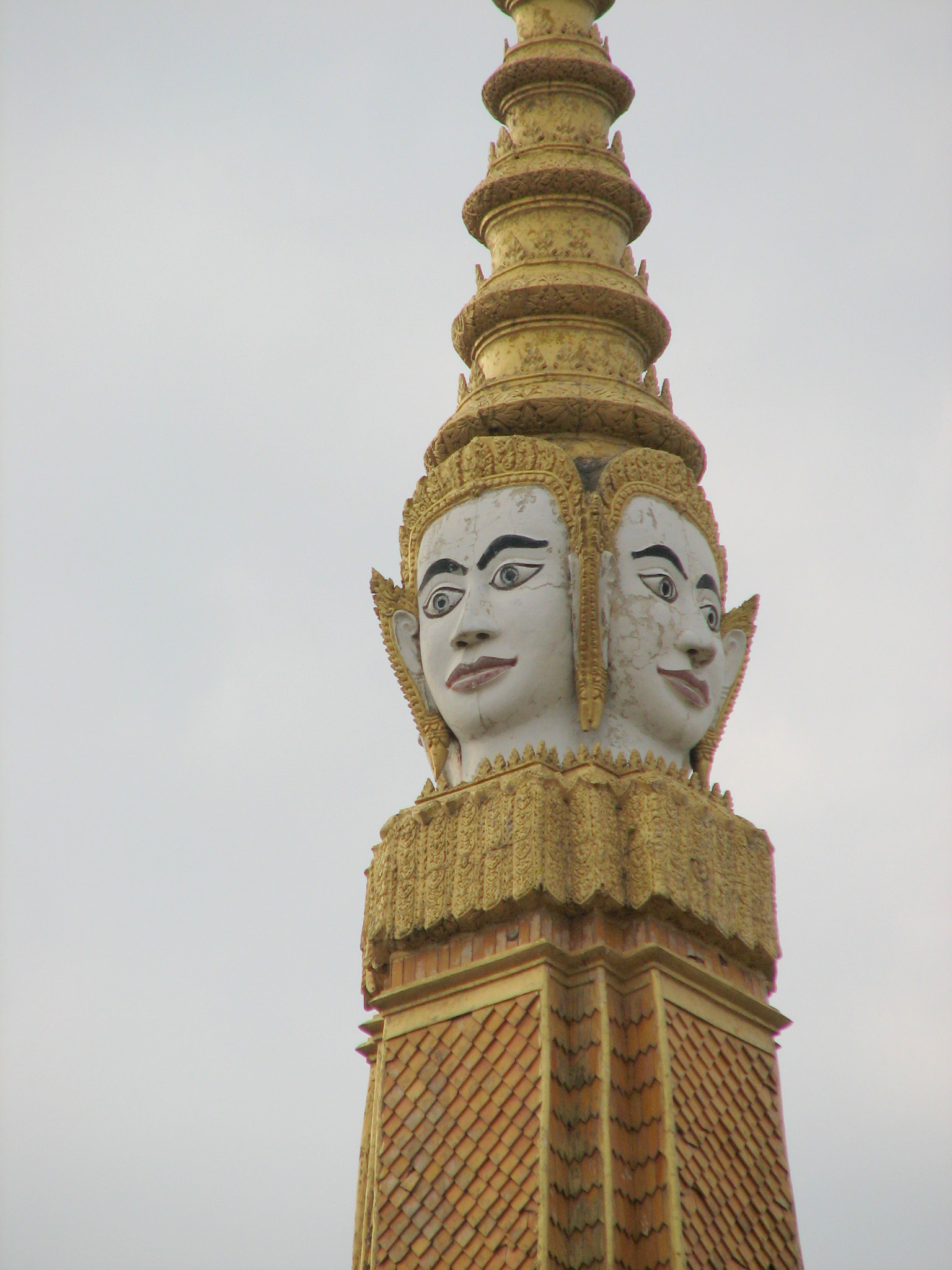 Royal Palace Stupa. Royal Palace including gardens and tombs and pagodas, Phnom Penh Cambodia הארמון המלכותי שעיר פנום פן בירת קמבודיה. הארמון נמצא במתחם סגור הכולל מבנים רבים גנים ופגודות שהינם קברים של בני המשפחה המלכותית